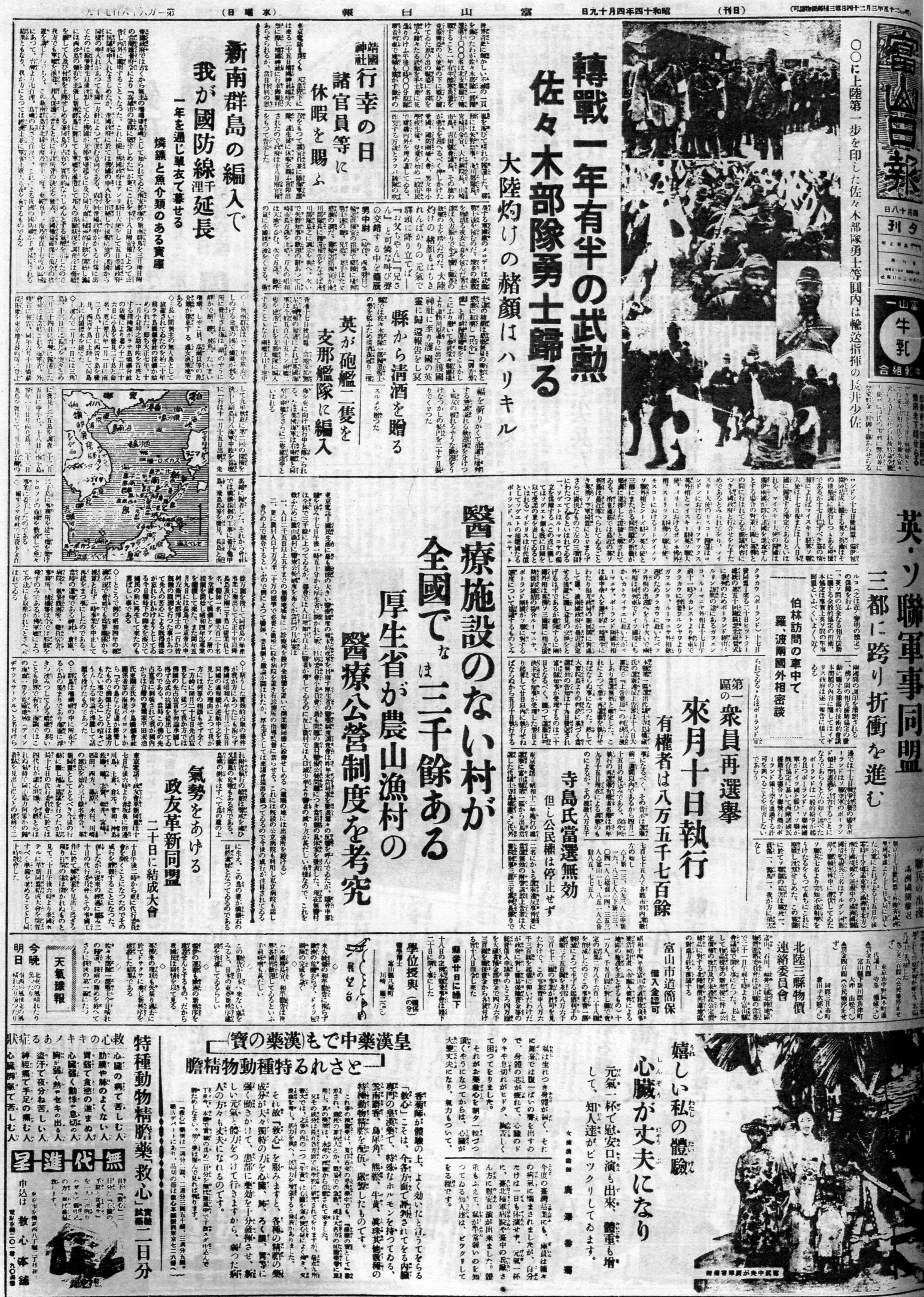 富山県第一区から出馬の寺島権蔵が選挙違反で当選無効となること。新南群島の編入。